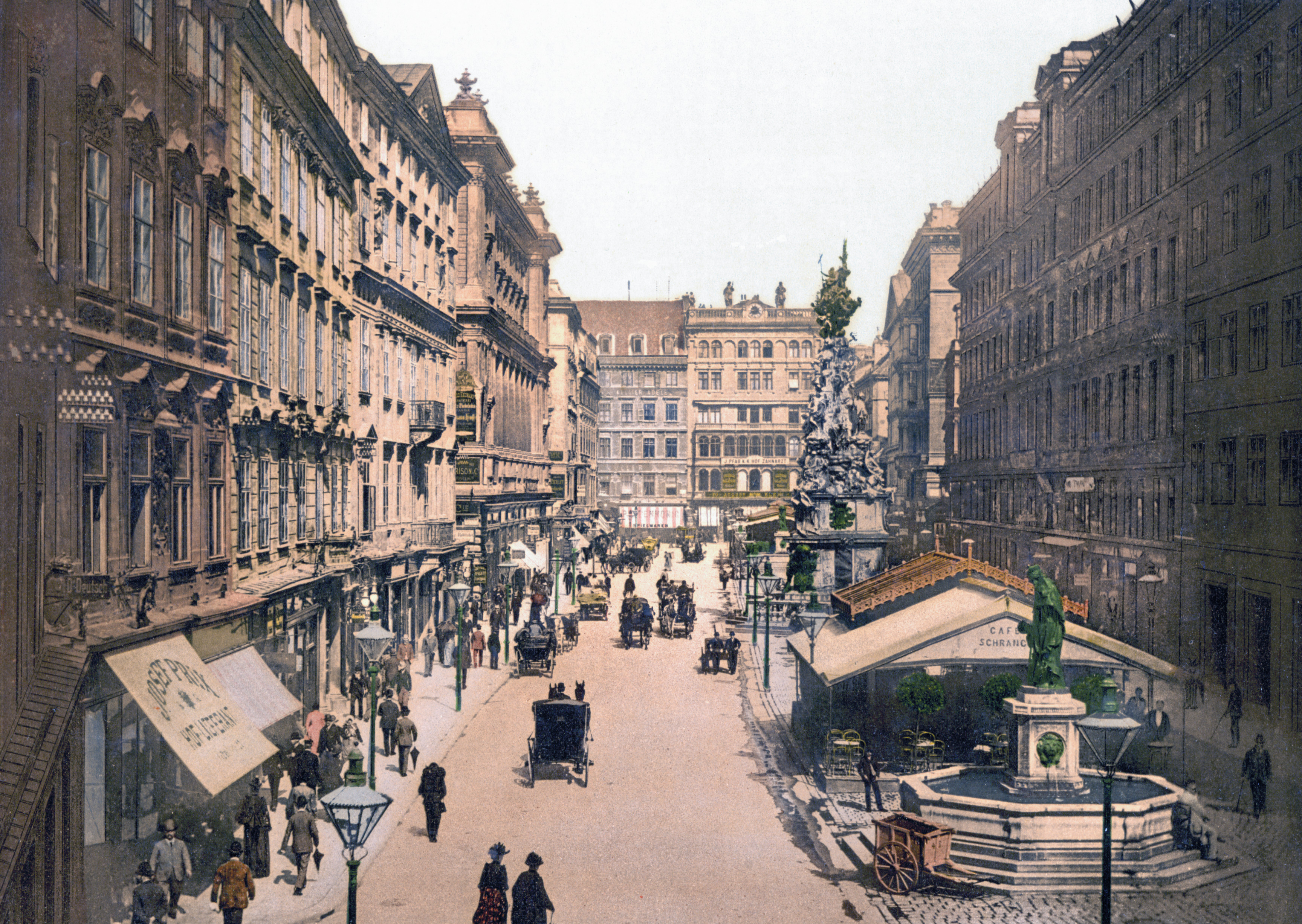 Graben in Wien um 1900